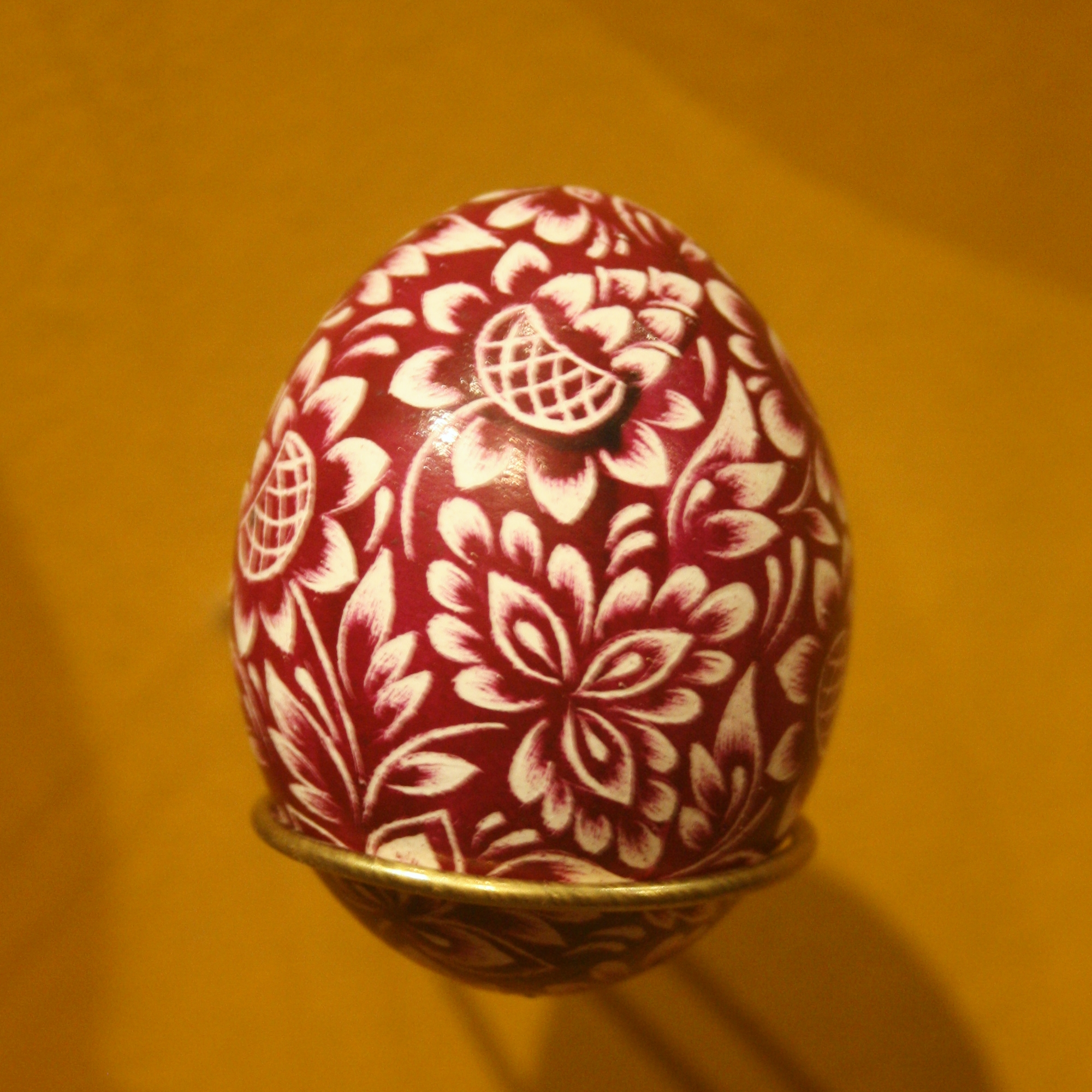 Národopisné muzeum - Musaion: kraslice zdobená vyškrabováním (Jižní Morava, konec 20. století)